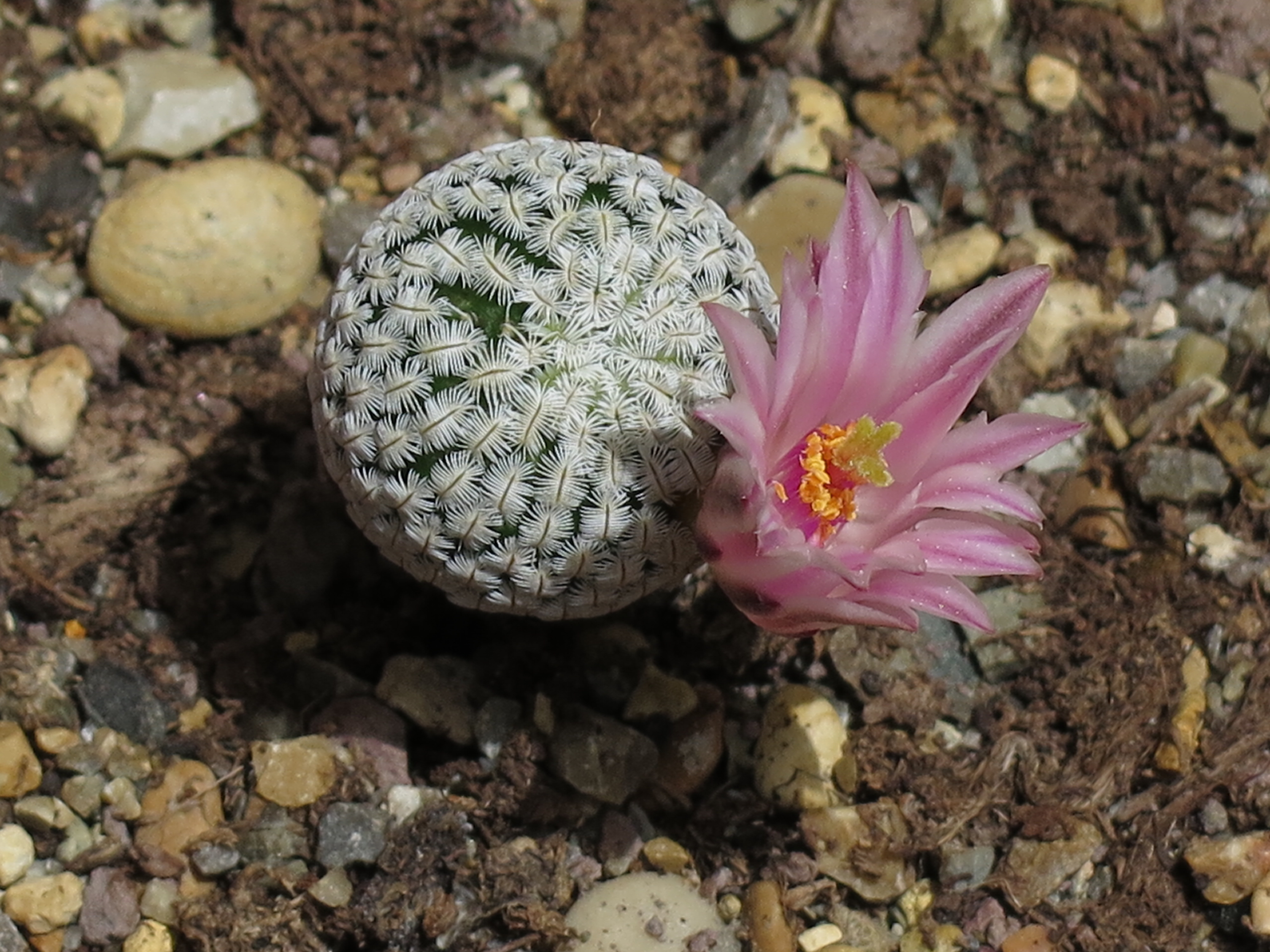 Mammillaria pectinifera in fiore